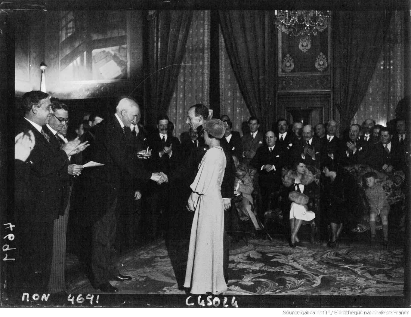 M. de Fontenay remet la médaille de la ville de Paris à Mme et M. Brunet Joly lors d’une réception des athlètes olympiques français à l’Hôtel de Ville de Paris, le 20 octobre 1932.